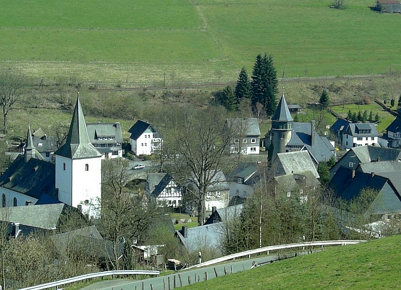 Brunskappel (Olsberg) , Germany.